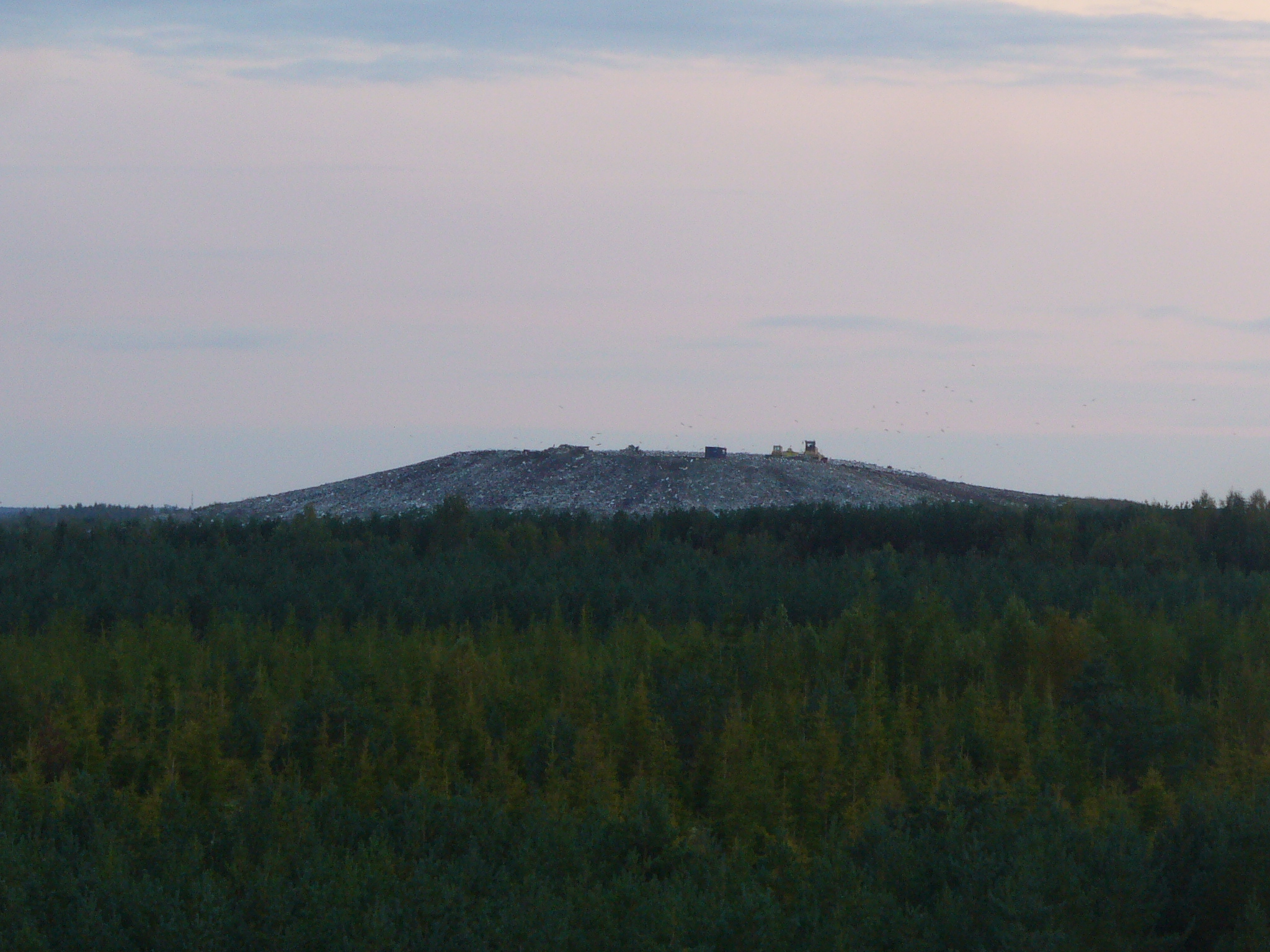 Jõelähtme prügila.